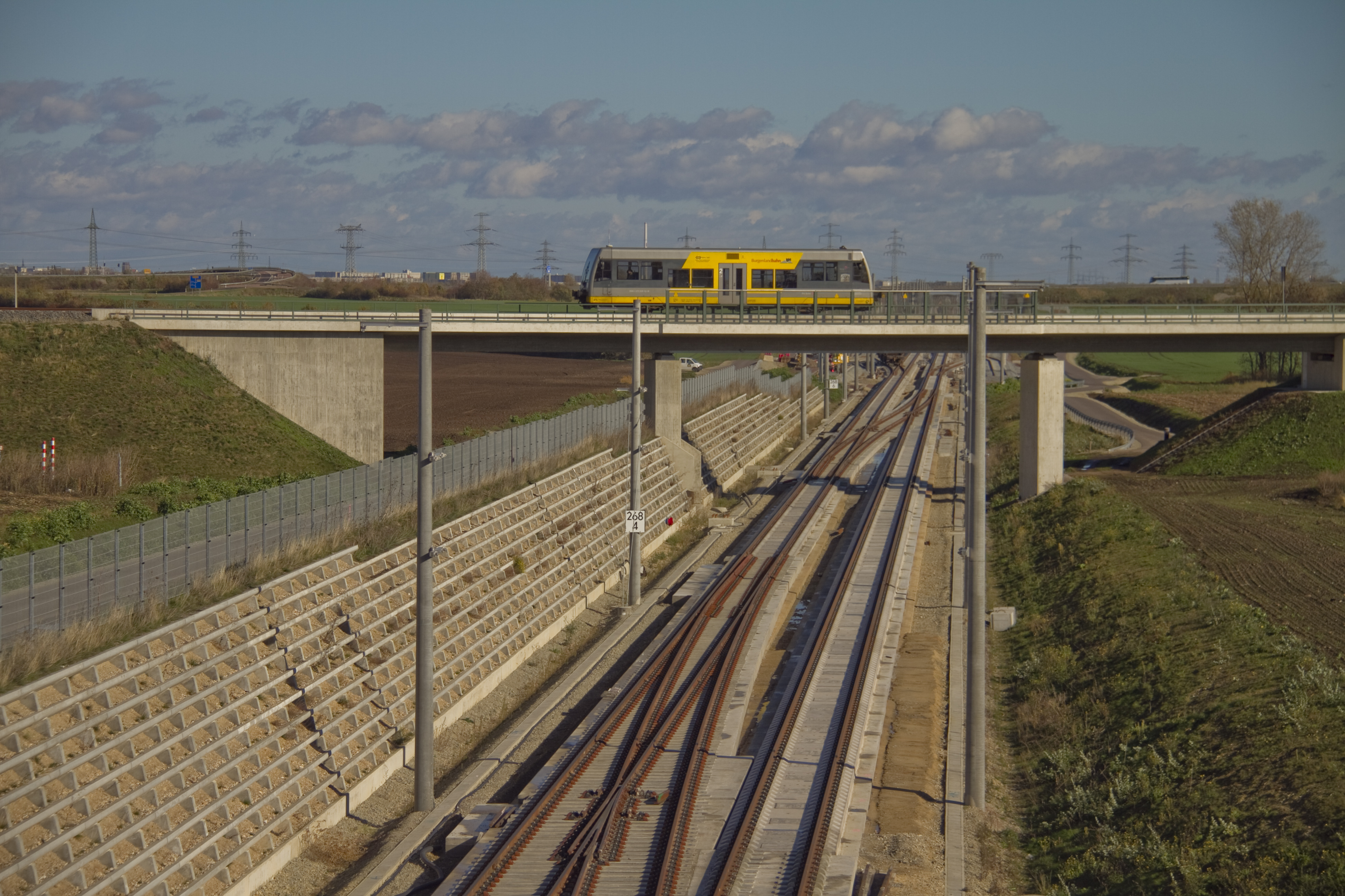 Überholbahnhof Dörstewitz Oktober 2013 im Bau mit Kreuzung Nebenbahn bei Bad Lauchstädt